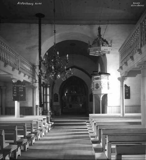 Alstadhaug kyrkje interiør